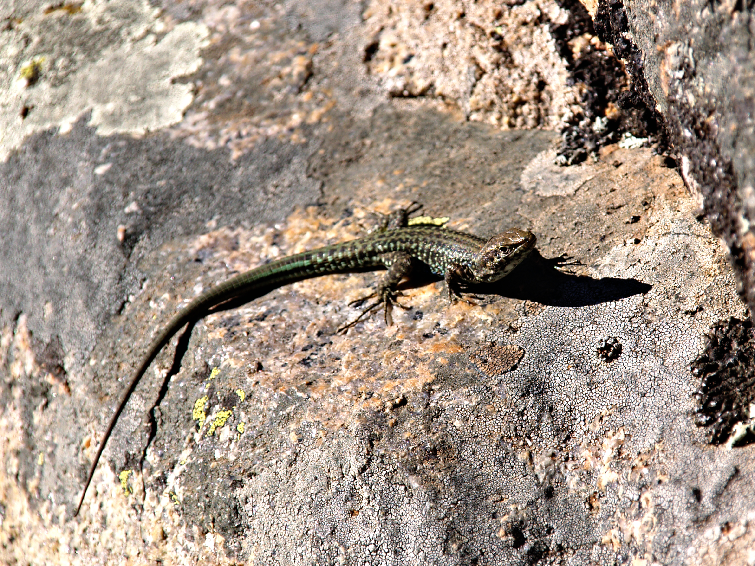 Albertacce (Corsica) - Lézard à Radule